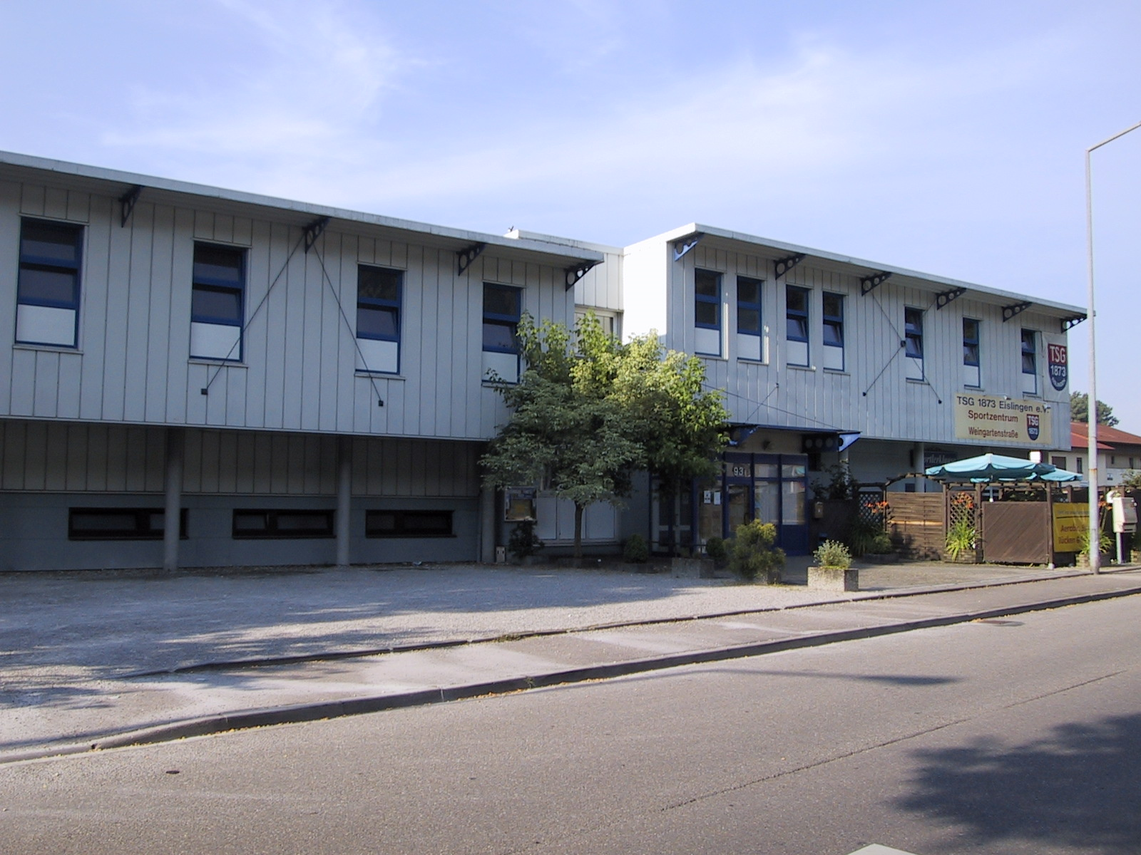 Geschäftsstelle